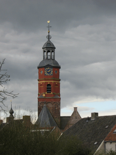 St. Lambertus te buren te zien vanaf de Weeshuiswal.